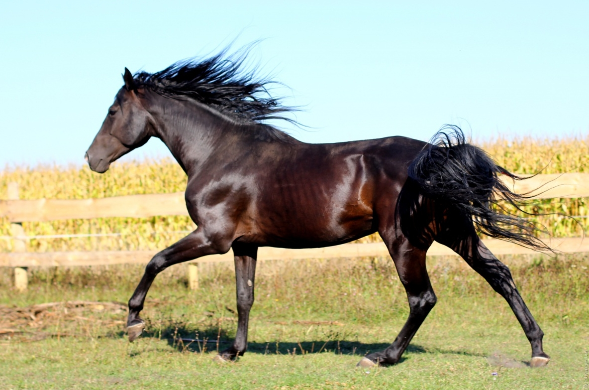 Український кінь